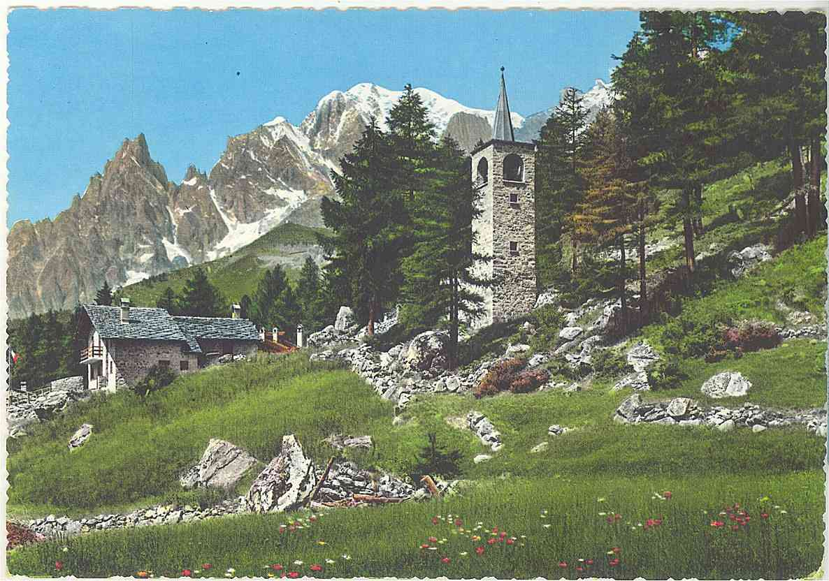 AO Courmayeur - la chiesetta del Planpincieux